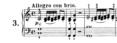 Compassos iniciais do primeiro movimento da Sonata Op. 2 n. 3 de Beethoven